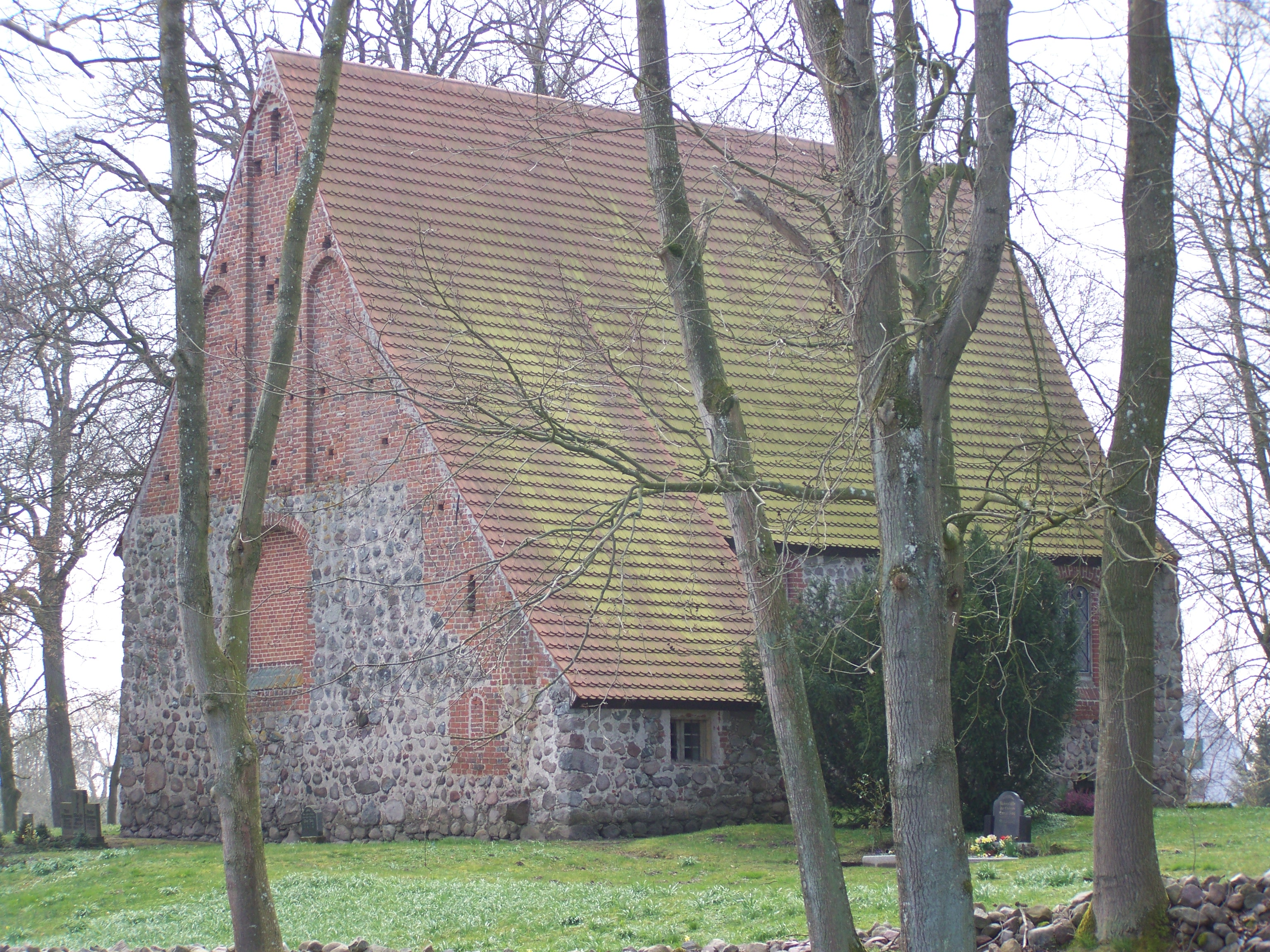 Dorfkirche_Drechow